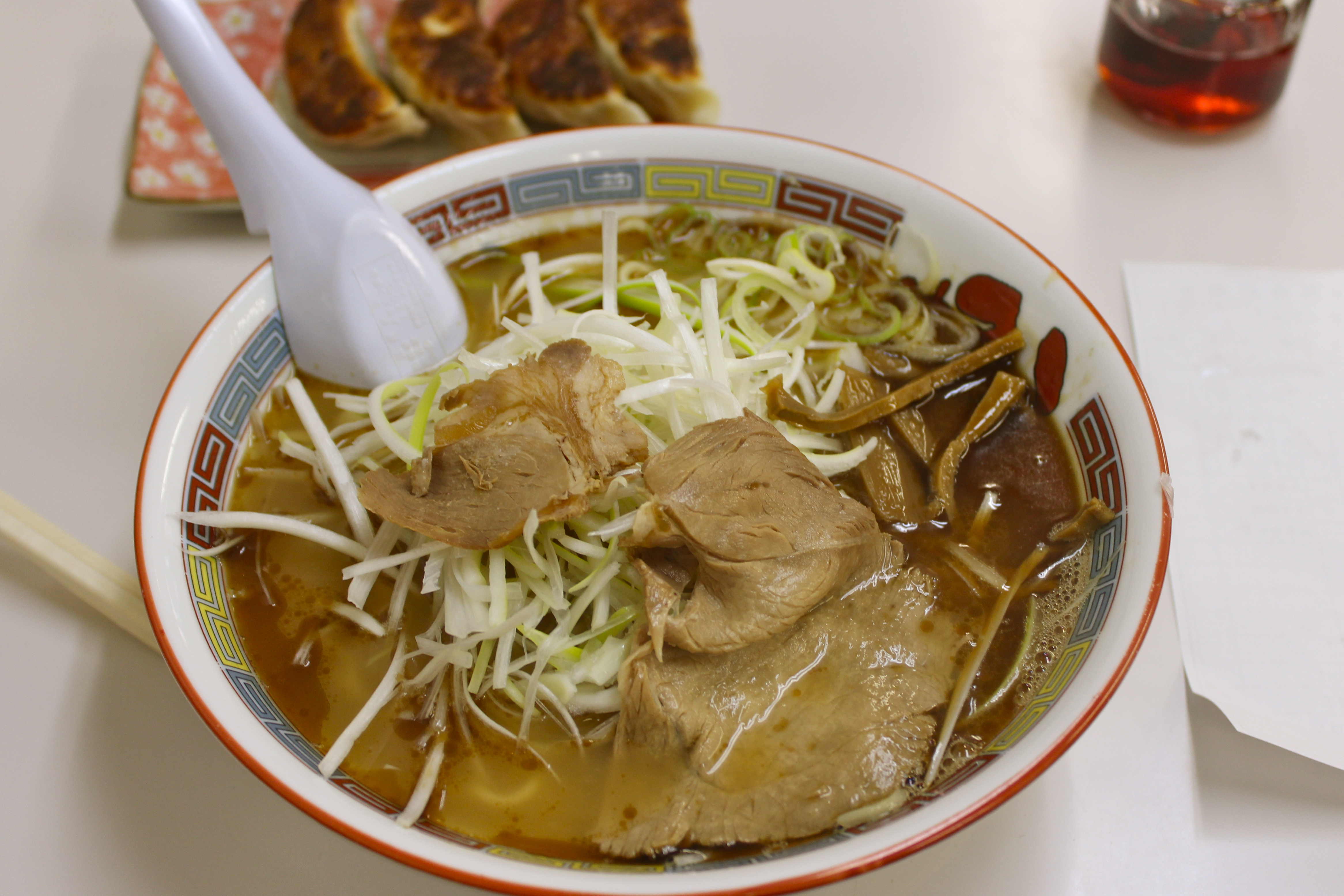 旭川市内蜂屋